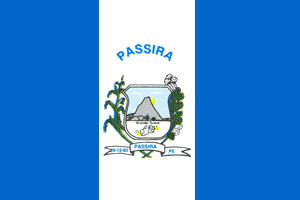 Bandeira do município de Passira-PE.